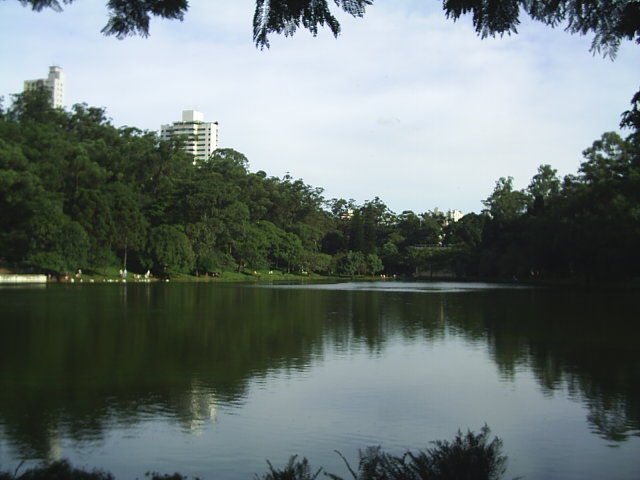 Parque da Aclimação em São Paulo.